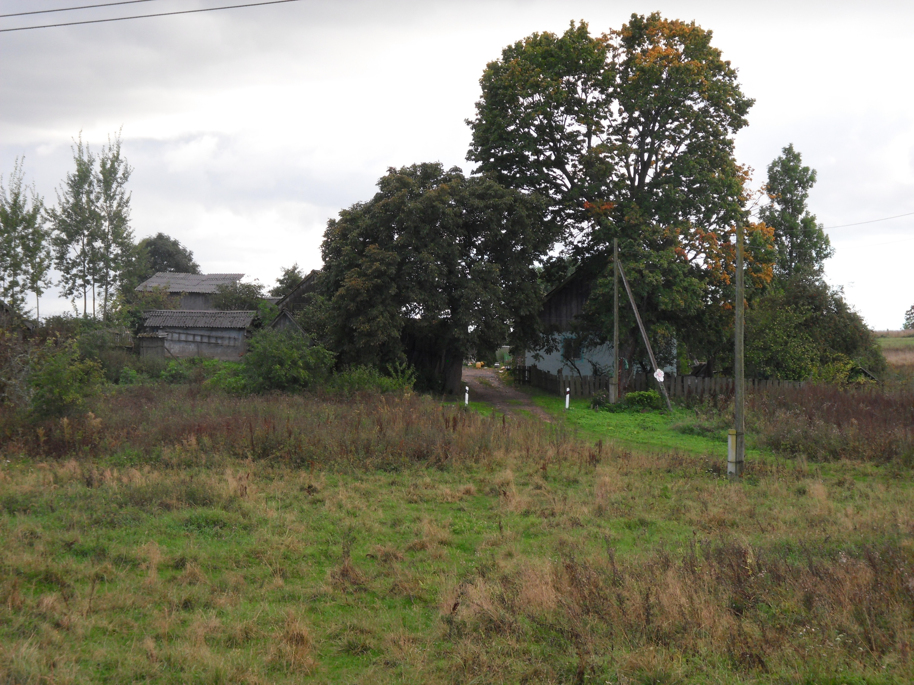 Groß Skirlack (ehem. Ortsteil Klein Skirlack)